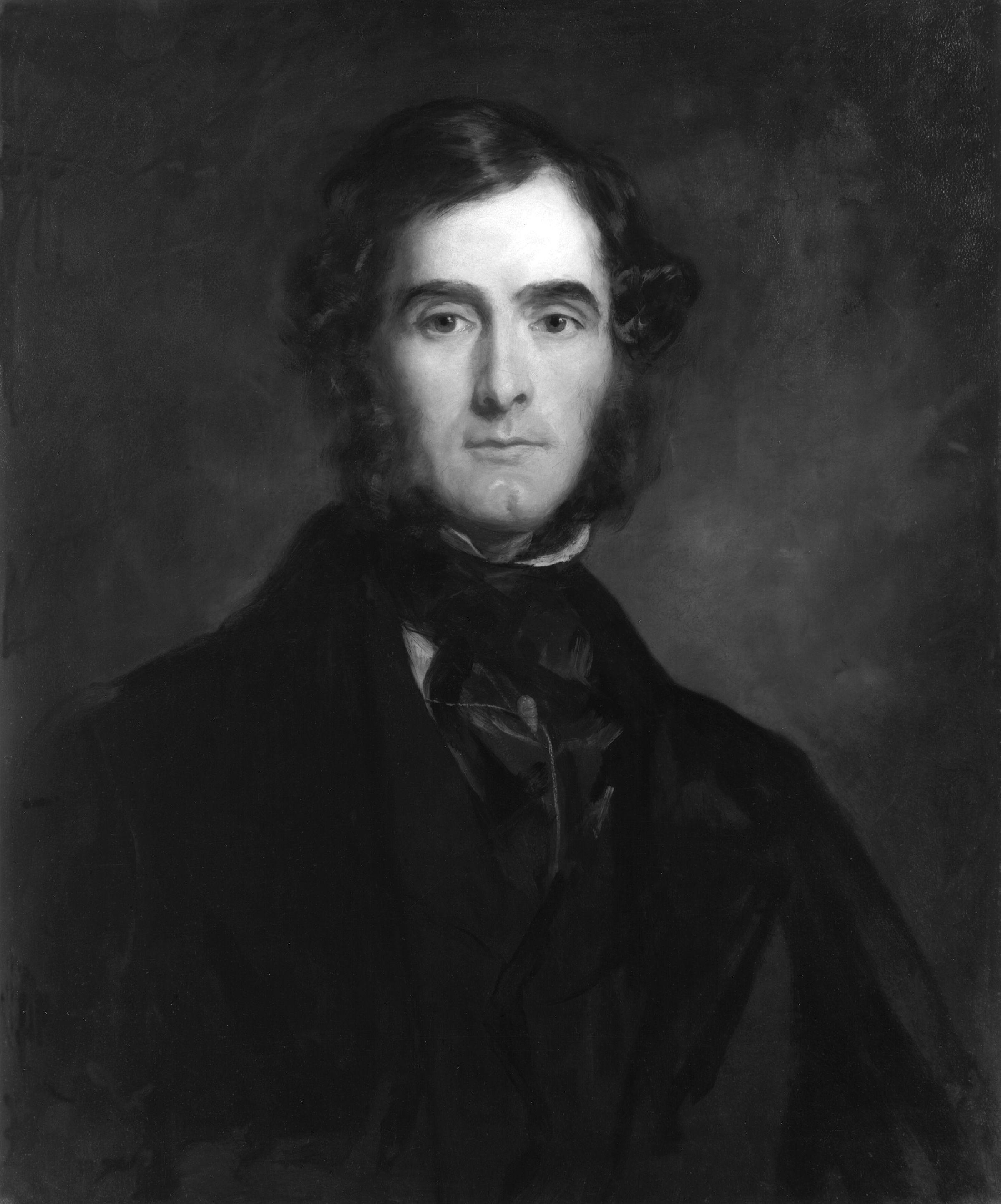 Self-portrait